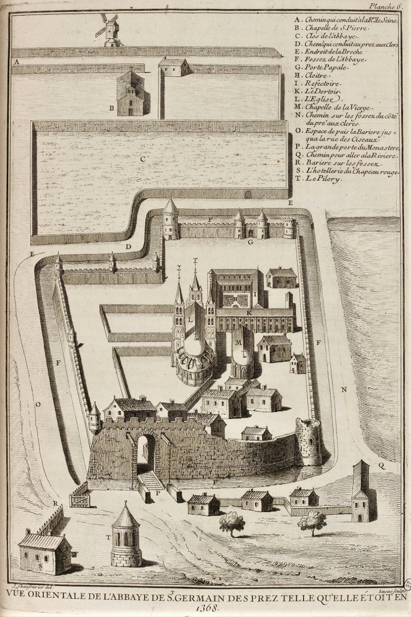 Abbaye Saint-Germain-des-Près en 1368 - Jacques Bouillart, Histoire de l'abbaye royale de Saint-Germain-des-Prez , contenant la vie des abbés qui l'ont gouvernée depuis sa fondation, 1724, planche 6